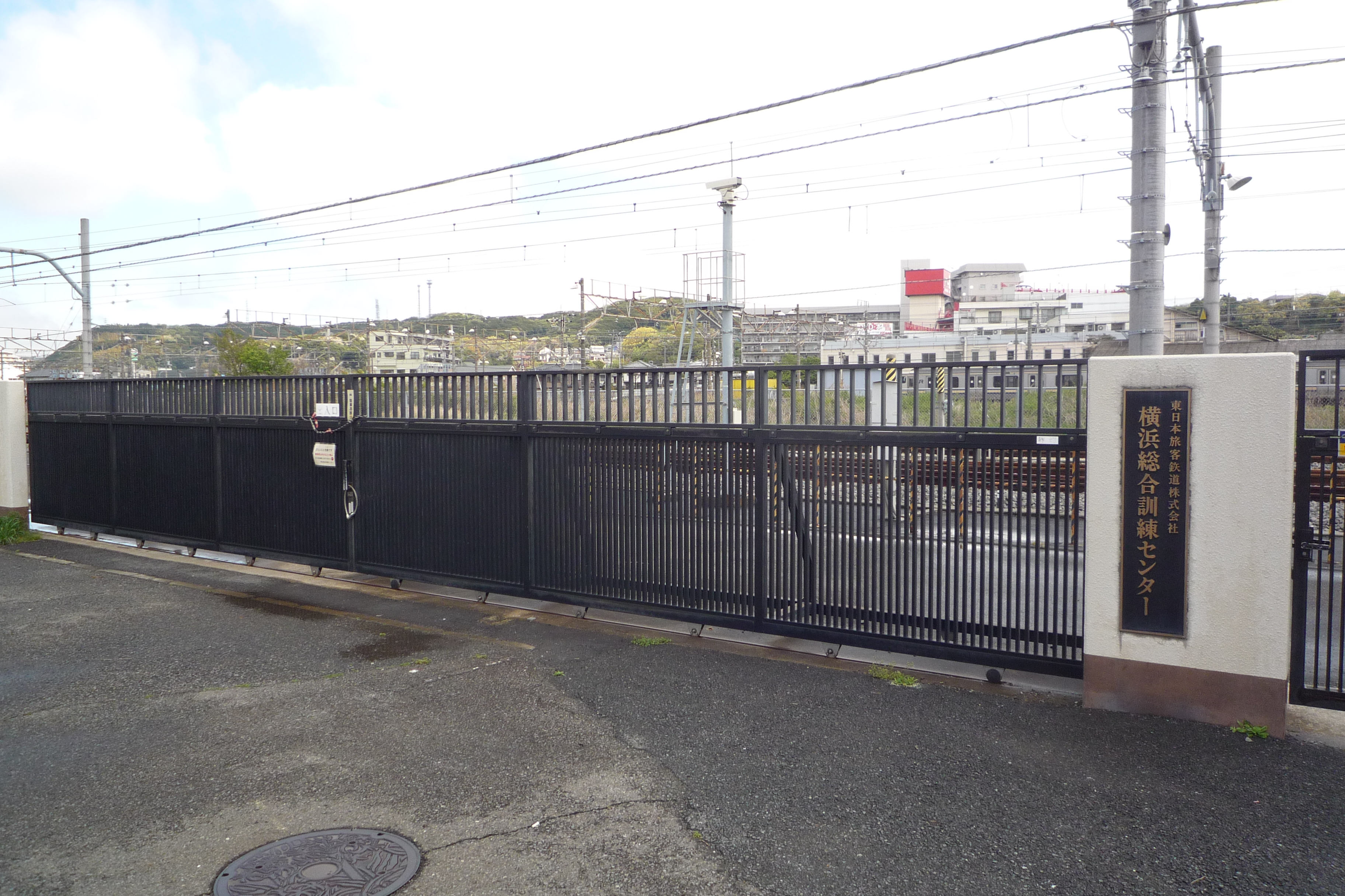 久里浜駅裏にある乗務員訓練センターの正門の写真。